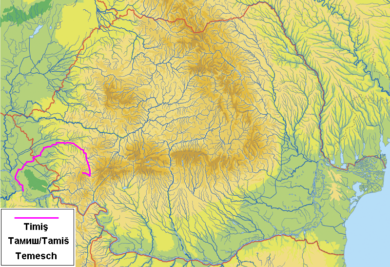 Timis river